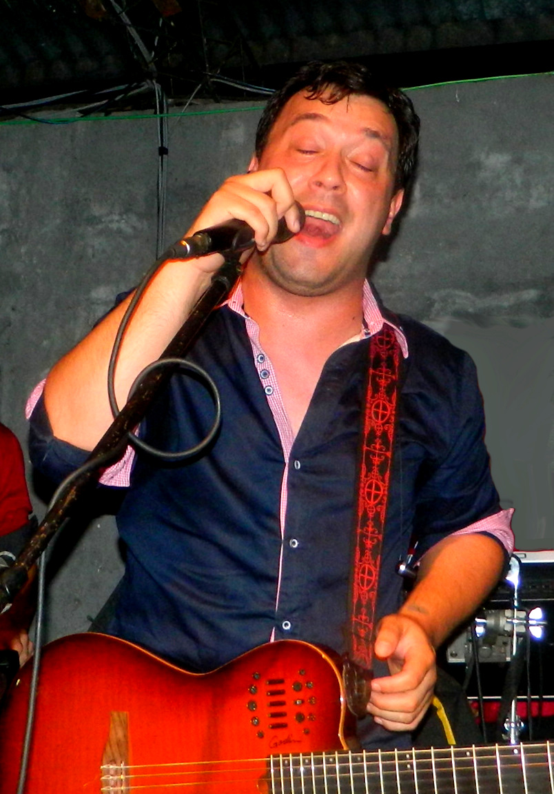 Lucas Sugo en Las Cañas, Fray Bentos. Verano 2014.